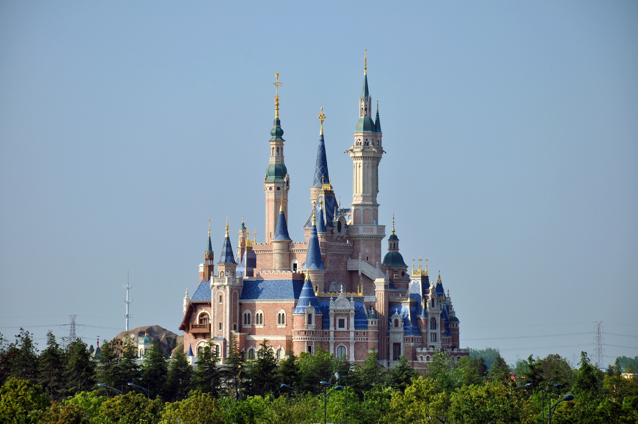 中文（中国大陆）: 上海迪士尼乐园 奇幻童话城堡